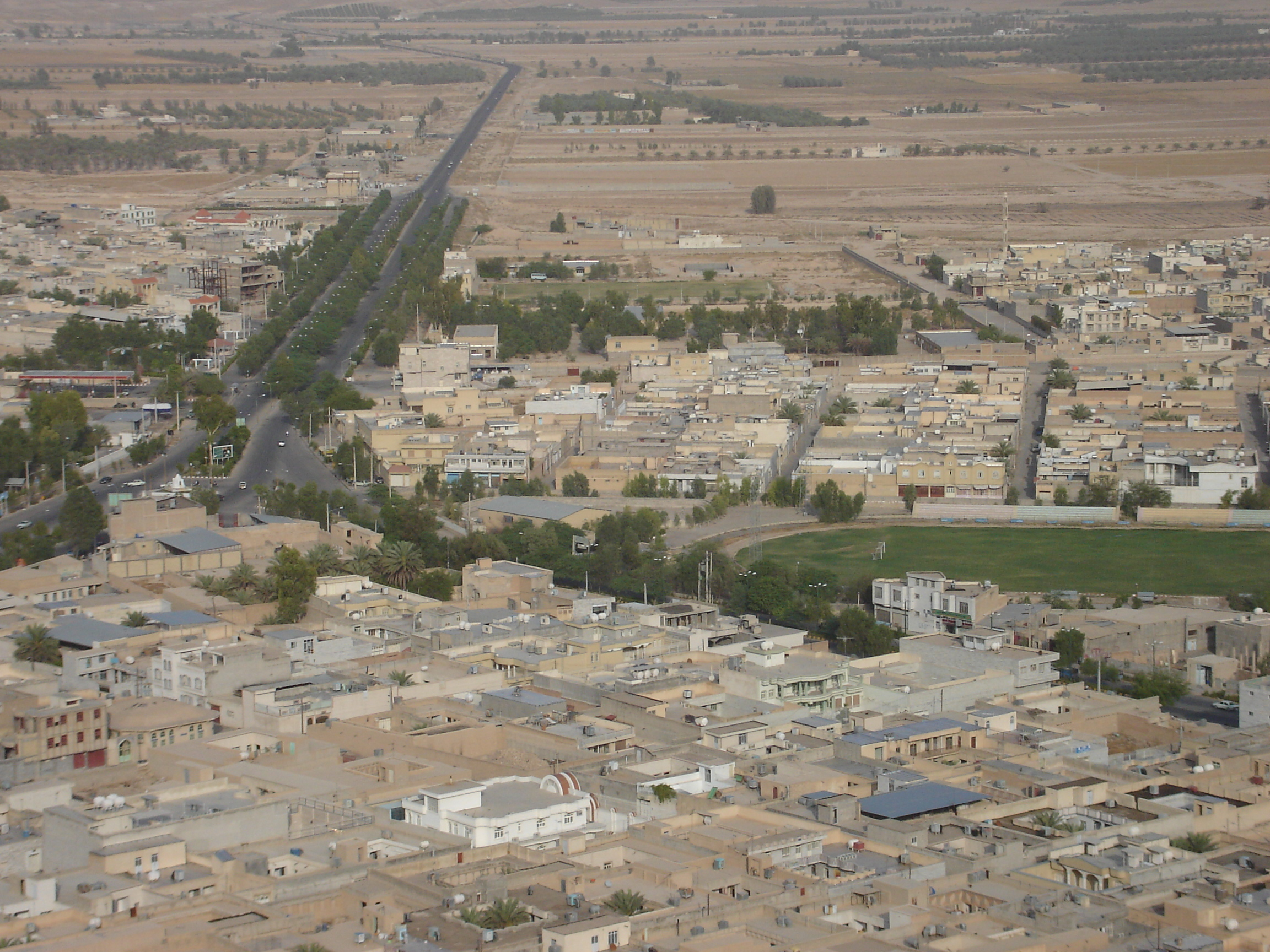 چشم‌اندازی از گراش.